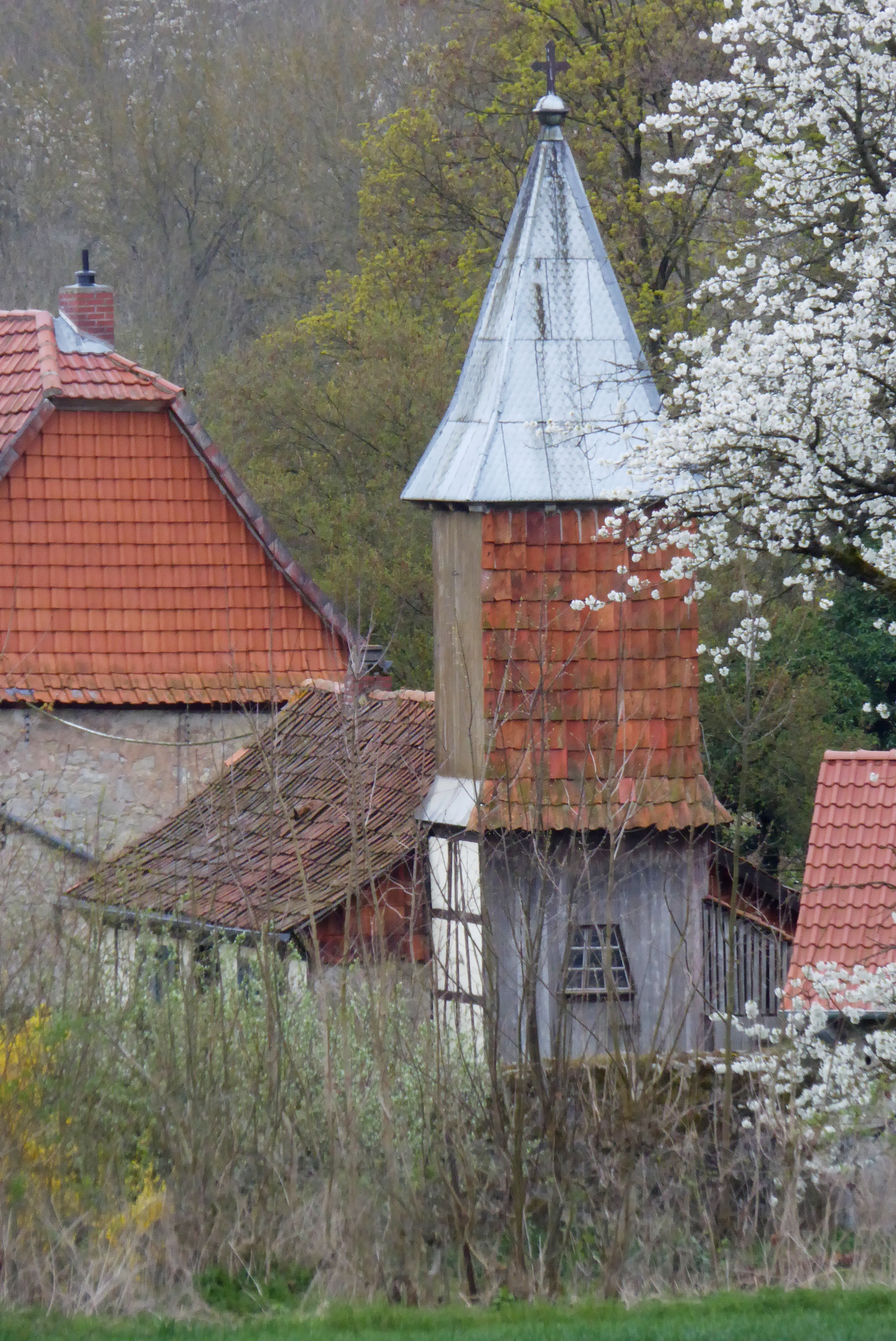 Fachwerkkapelle des Gutes Olenhusen bei Settmarshausen, Gemeinde Rosdorf, Südniedersachsen. Erbaut in der zweiten Hälfte des 19. Jahrhunderts